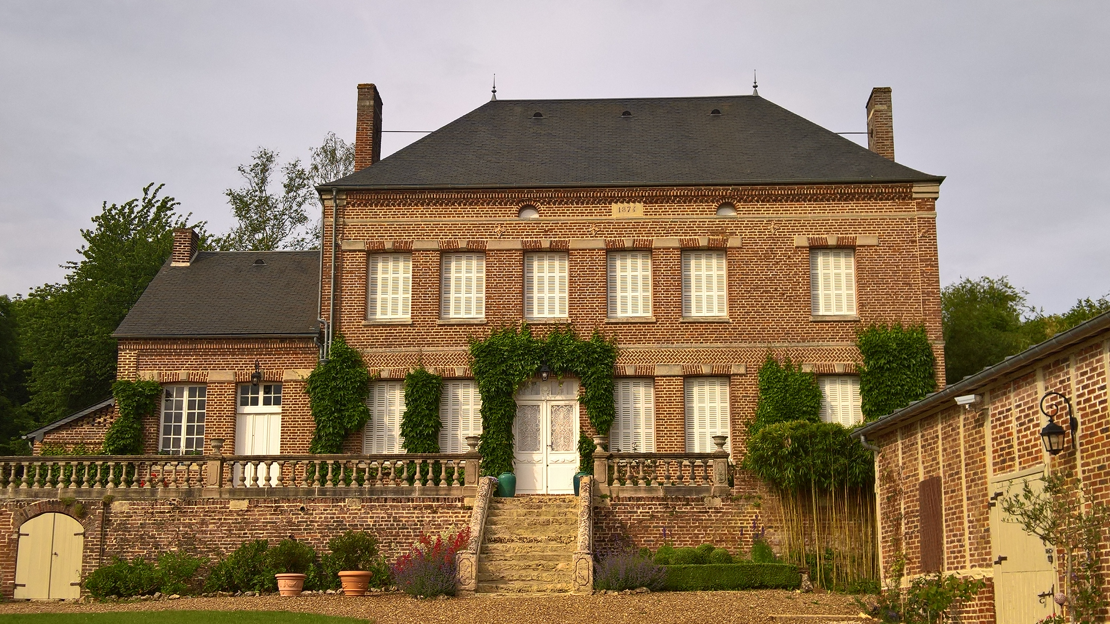 Maisoncelle-Tuilerie : Château, rue principale